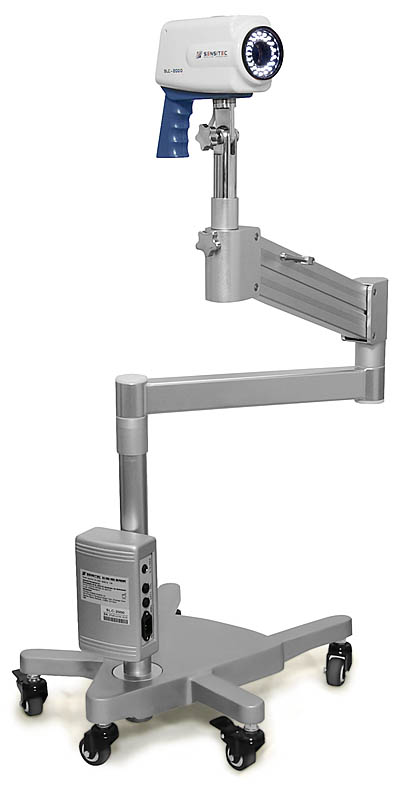 Внешний вид кольпоскопа на шарнирной стойке